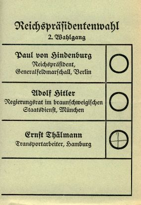 Original-Stimmzettel zur Reichspräsidentenwahl 1932, 2. Wahlgang am 10. April: Hindenburg, Hitler, Thälmann - selbst gescanntes Bild